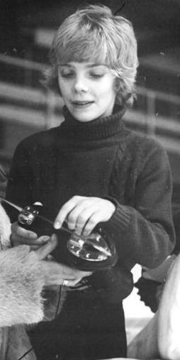 K. Enke, Lehmann, H. Schulz, C. Grischke, K. Zobel ADN-ZB Häßler 20.12.1974 Dresden: DDR-Meisterschaften im Eiskunstlaufen begannen.- Am Rande der Eisfläche fachsimpeln in bester Stimmung (von links) Karin Enke, Trainerin Frau Lehmann, Hermann Schulz, Carmen Grischke und Karin Zobel (alle SC Einheit Dresden).